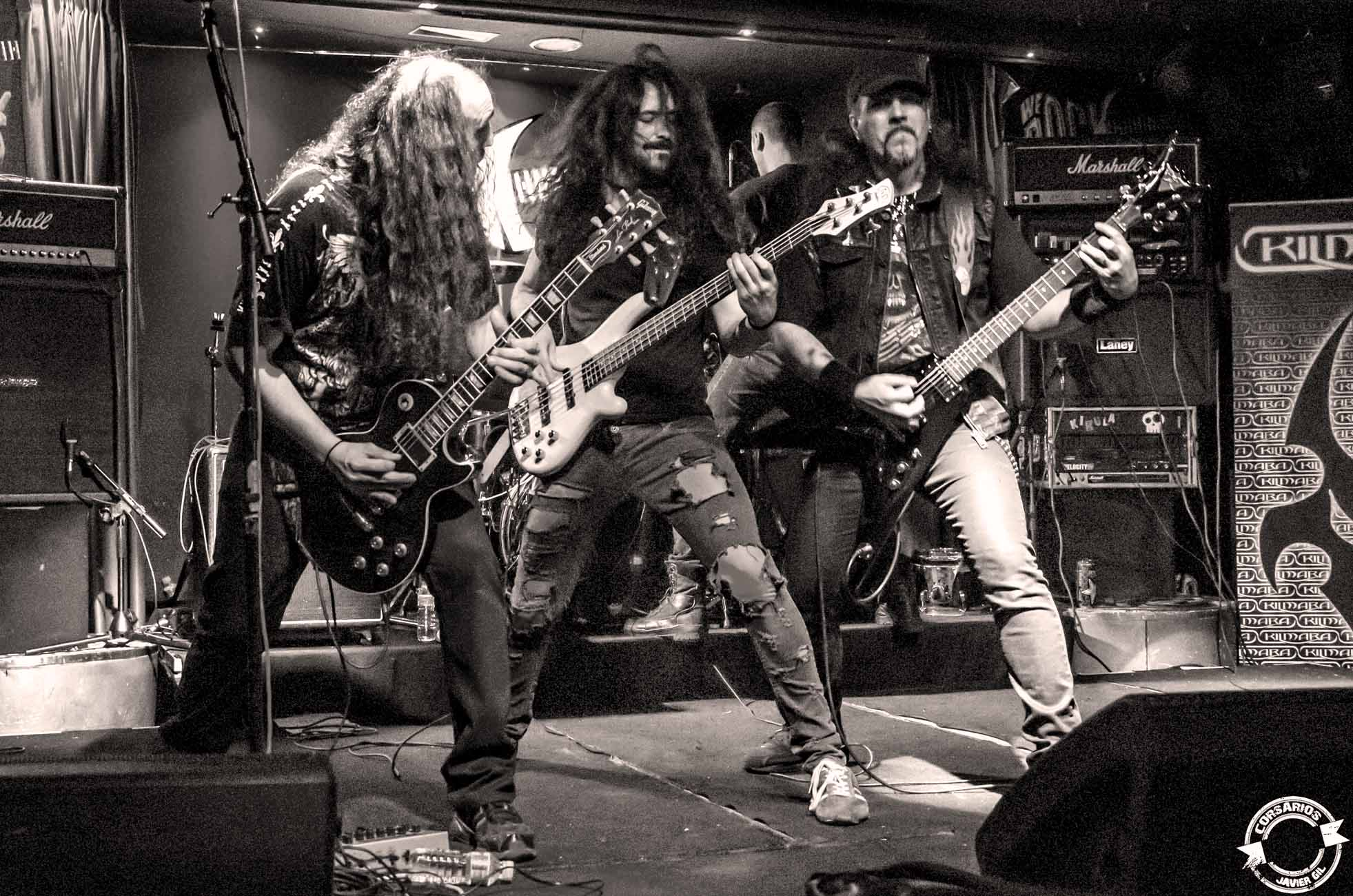 Kilmara počas vystúpenia